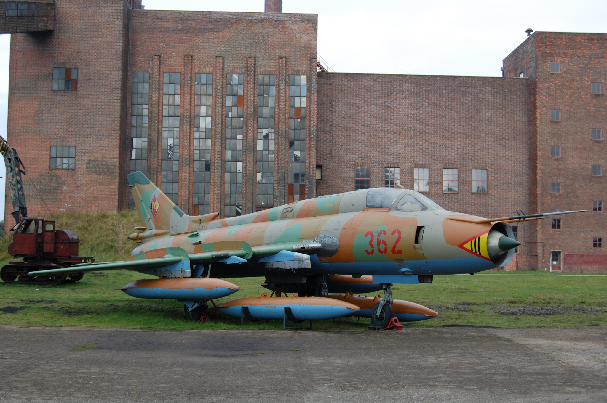 Suchoi SU-22 "Fitter" der NVA in Peenemünde